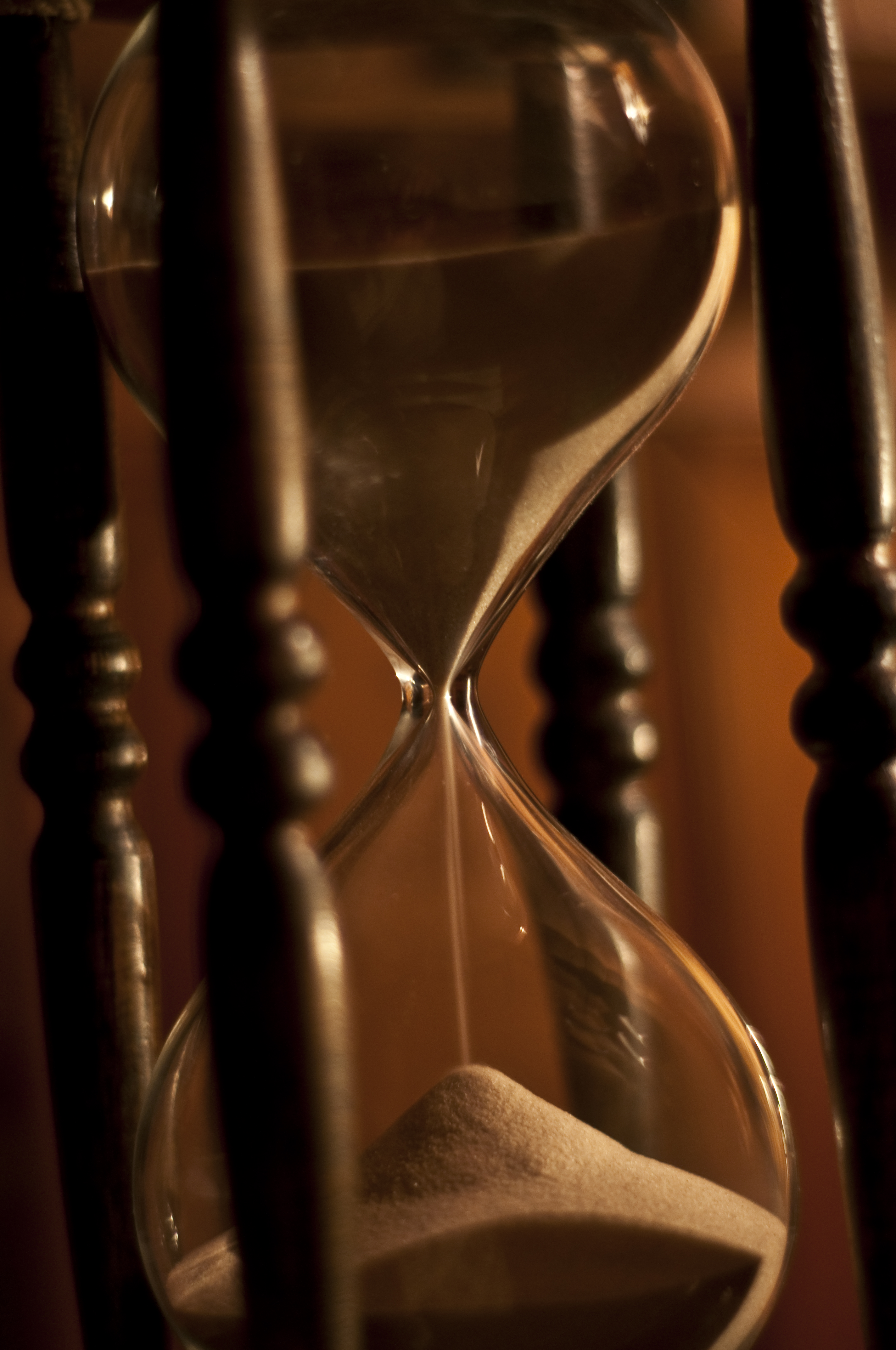 Ampulheta